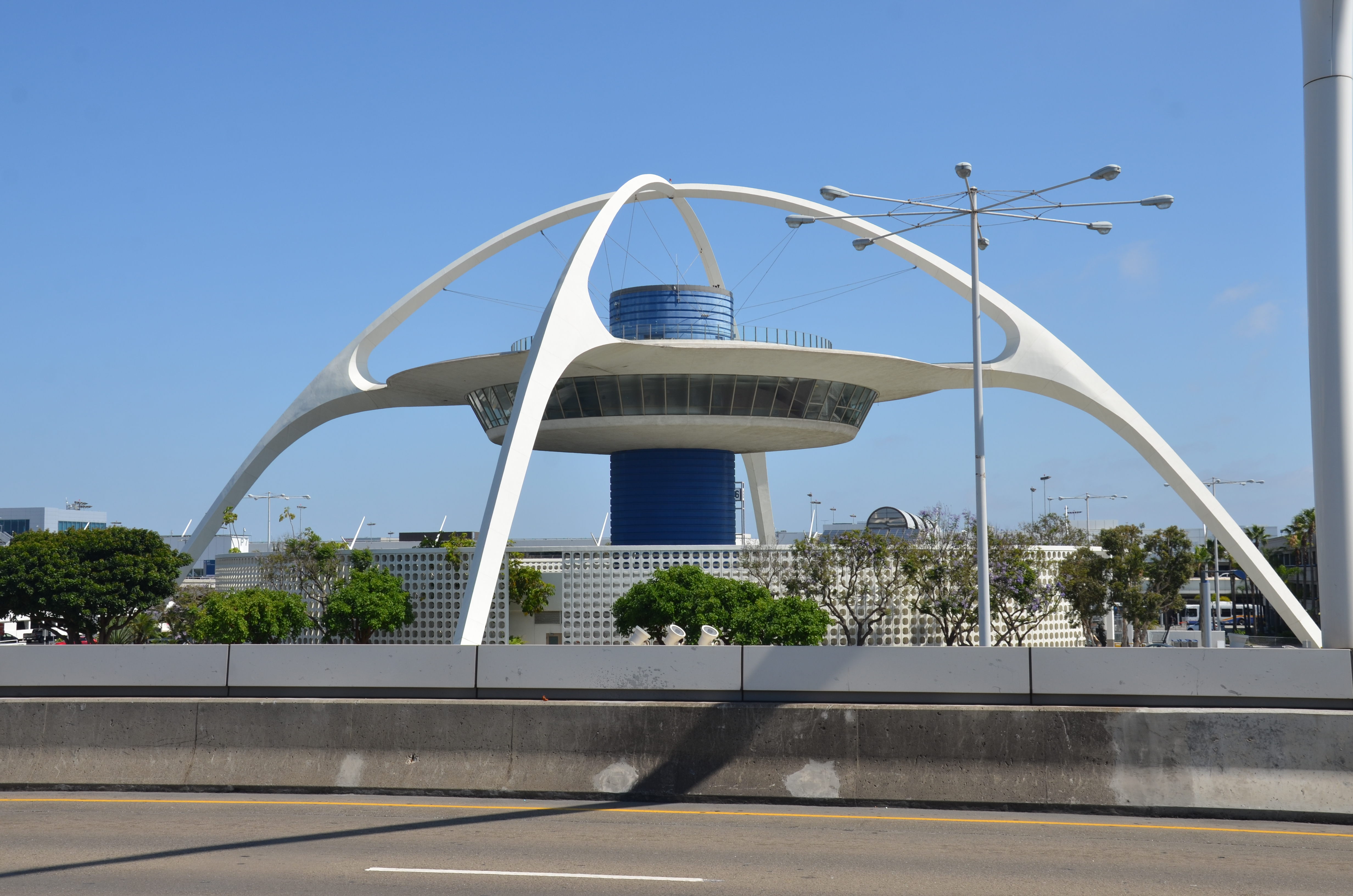 Het Theme-gebouw bij de internationale luchthaven van Los Angeles.